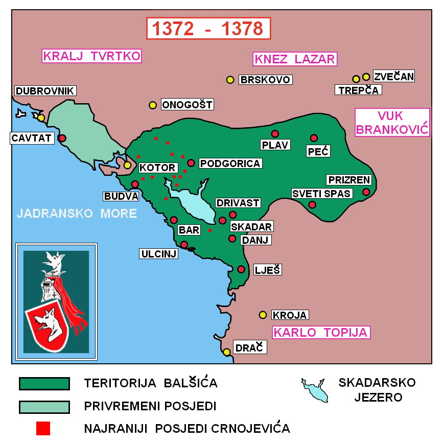 Posjedi Balšića u vrijeme Stracimira i Đurađa I.